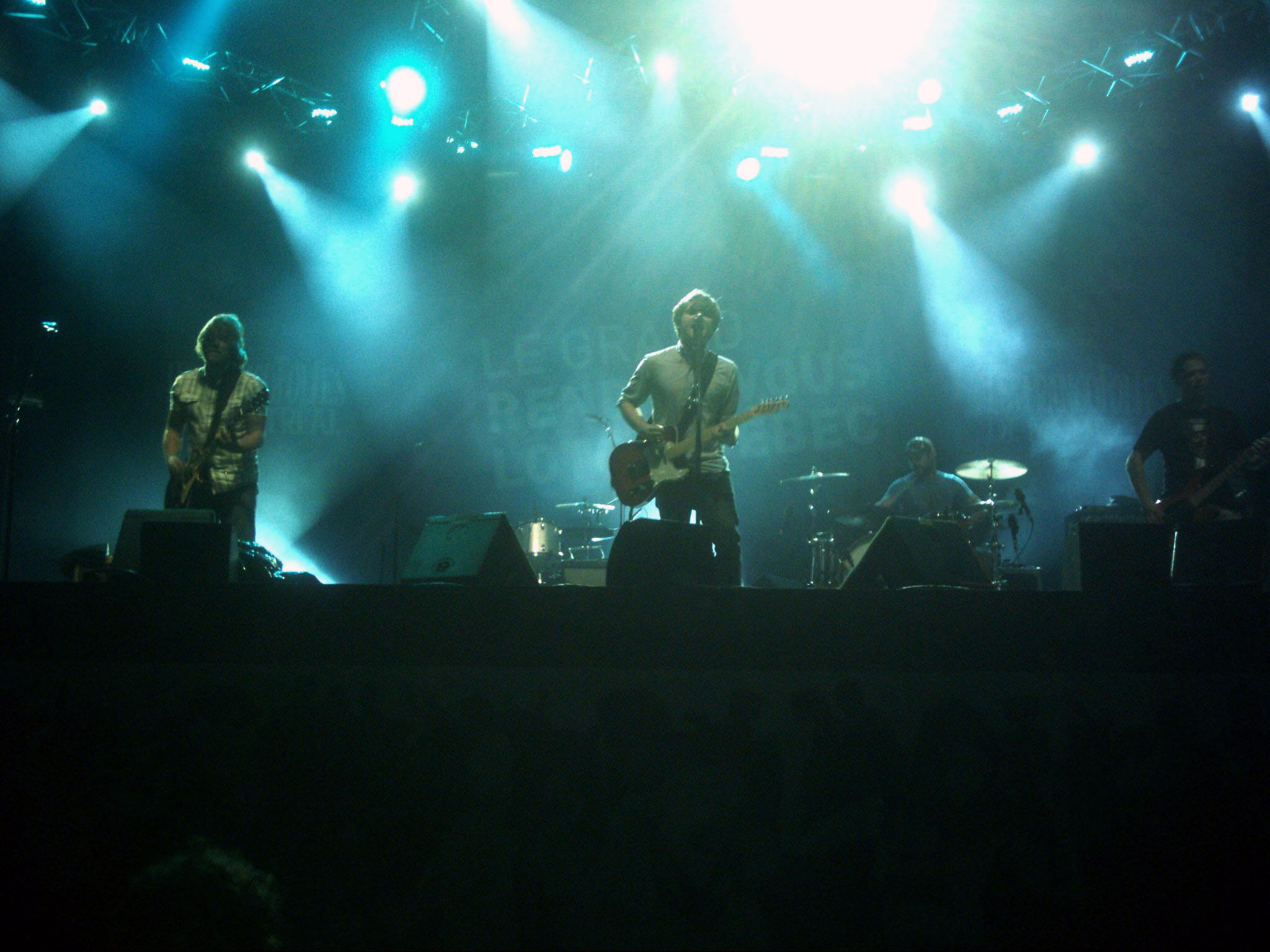 Les Trois Accords aux FrancoFolies de Montréal